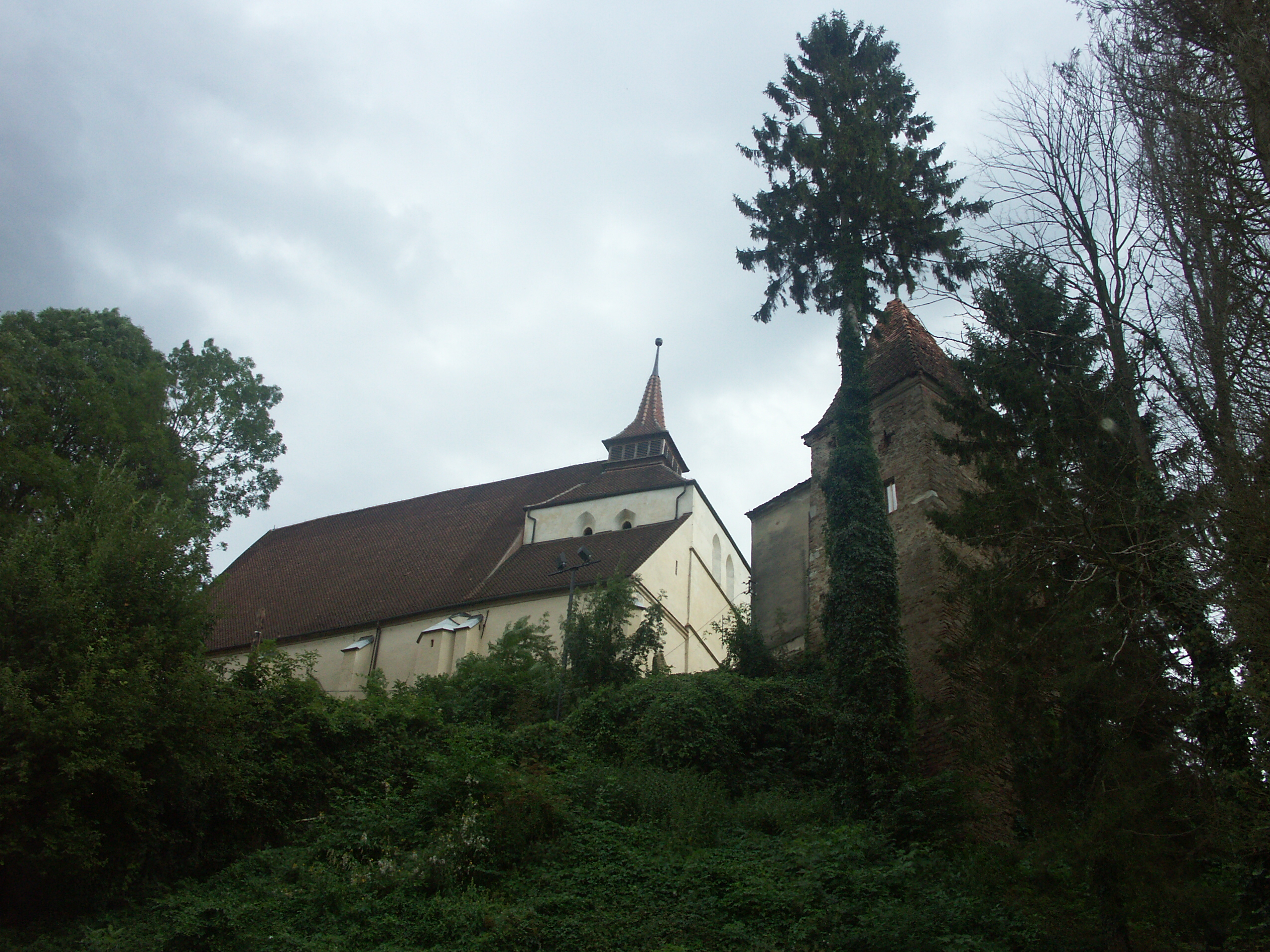 Bergkirche in Sighişoara (Schäßburg)